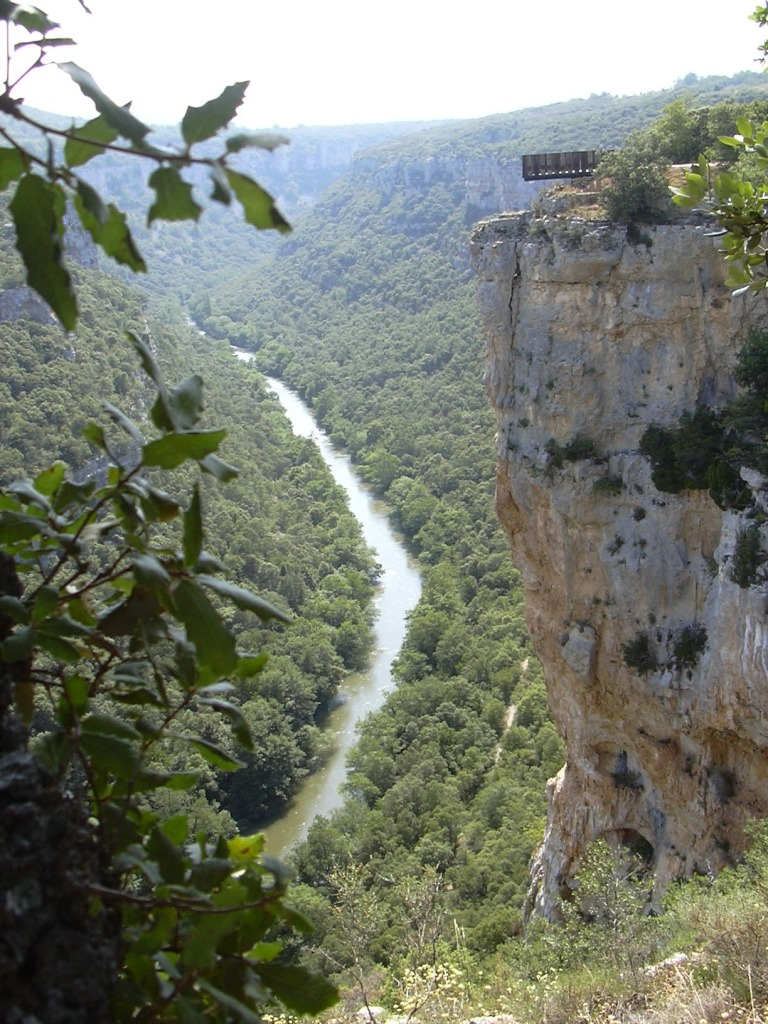 Cañón del Ebro (Burgos, Spain)